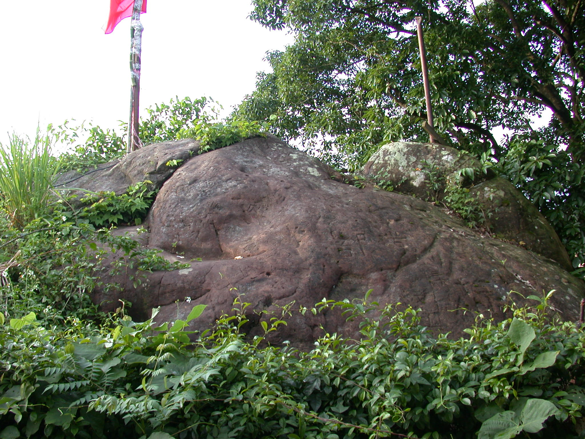 Bân-lâm-gú: 溪仔口山仙跡巖大巖石。